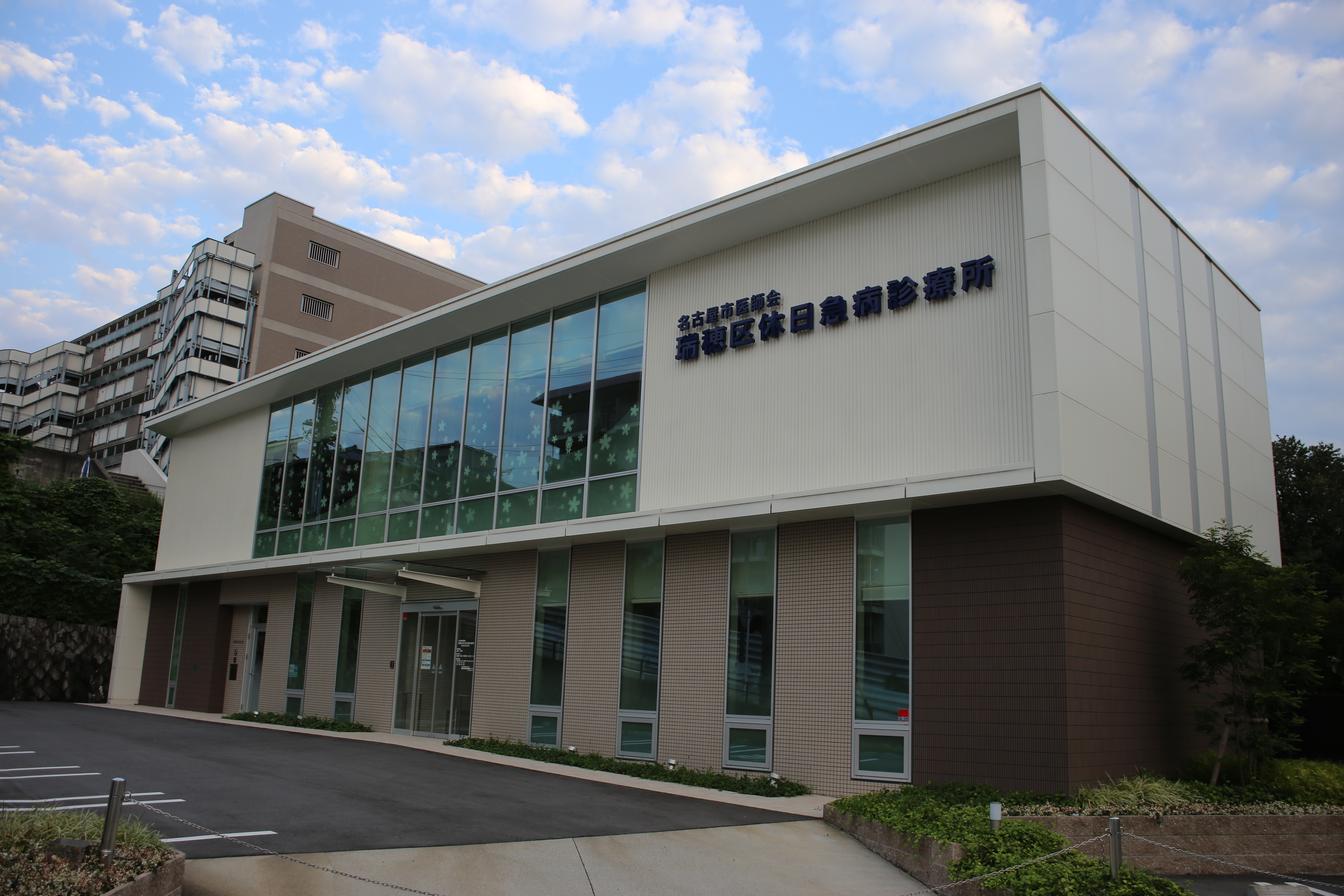 名古屋市瑞穂区師長町の名古屋市医師会瑞穂区休日急病診療所を西側公道北側より撮影